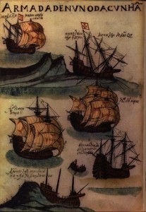 Portugese-karvele